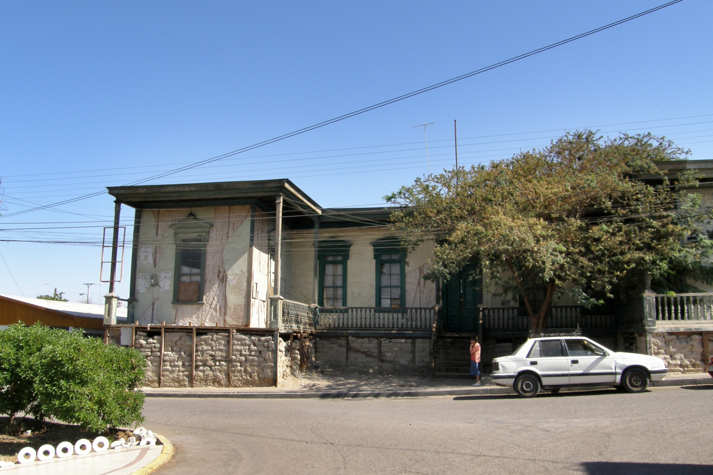 Maison natale de Remigio Morales Bermúdez. Pica, province d'El Tamarugal, région de Taracapa, Chili.